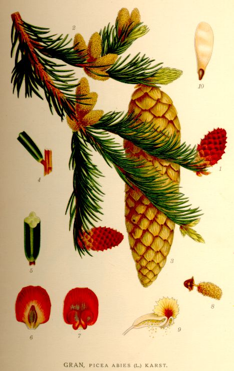 Picea abies